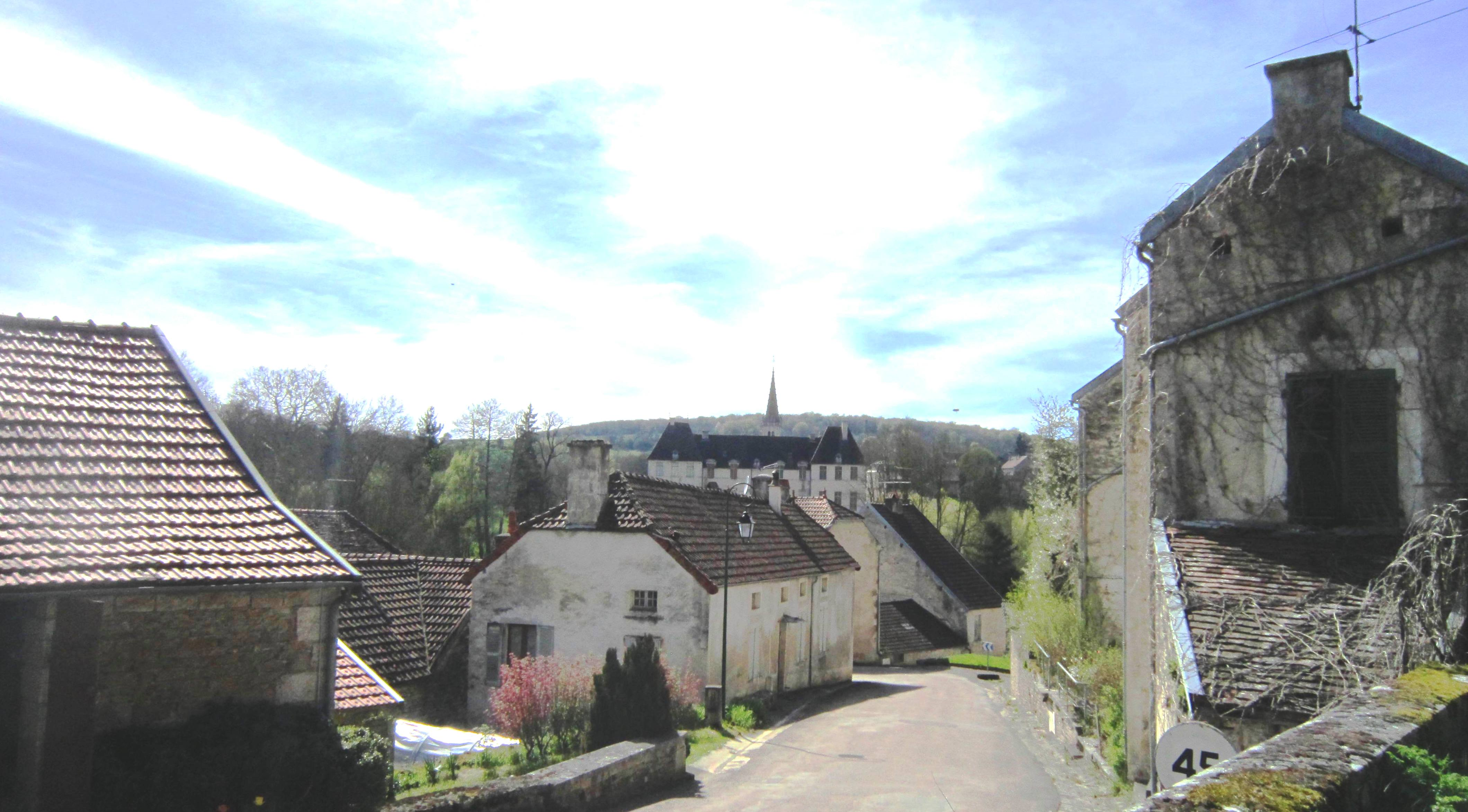 Montmoyen (Côte-d'Or)